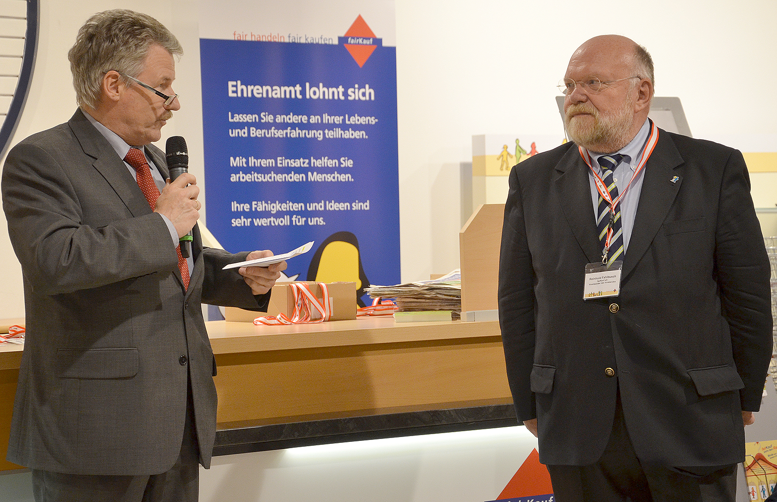 Der Bürgermeister von Langenhagen Friedhelm Fischer, hier bei seiner Rede zur Eröffnung des fairKauf im City Center Langenhagen (CCL) mit Reinhold Fahlbusch, Vorsitzender des Vorstandes der eingetragenen Genossenschaft ...